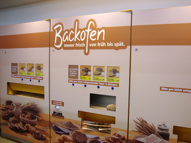 Foto von dem ALDI-Backshop-Automaten